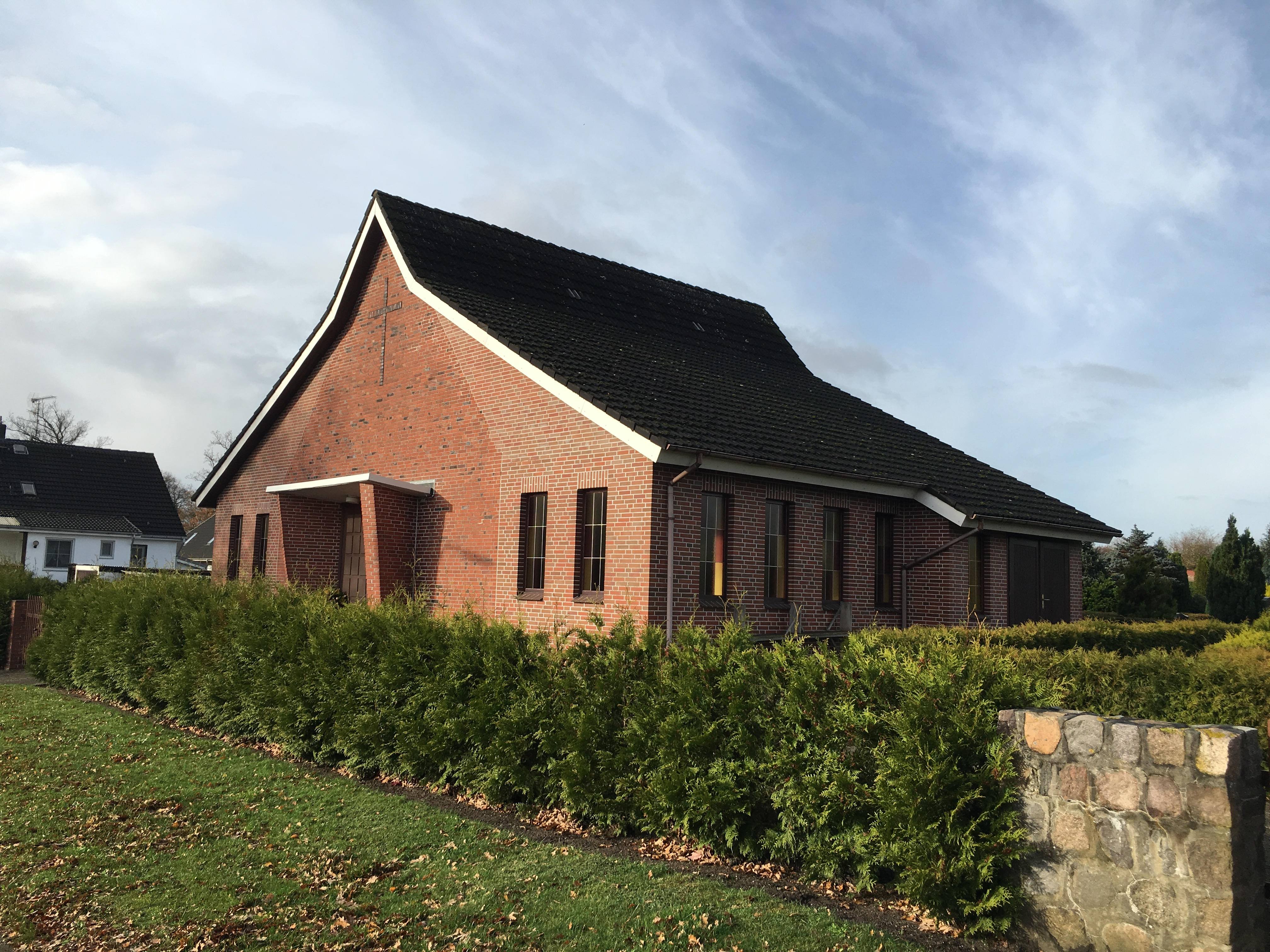 Kapell op’n Karkhoff Armsdörp